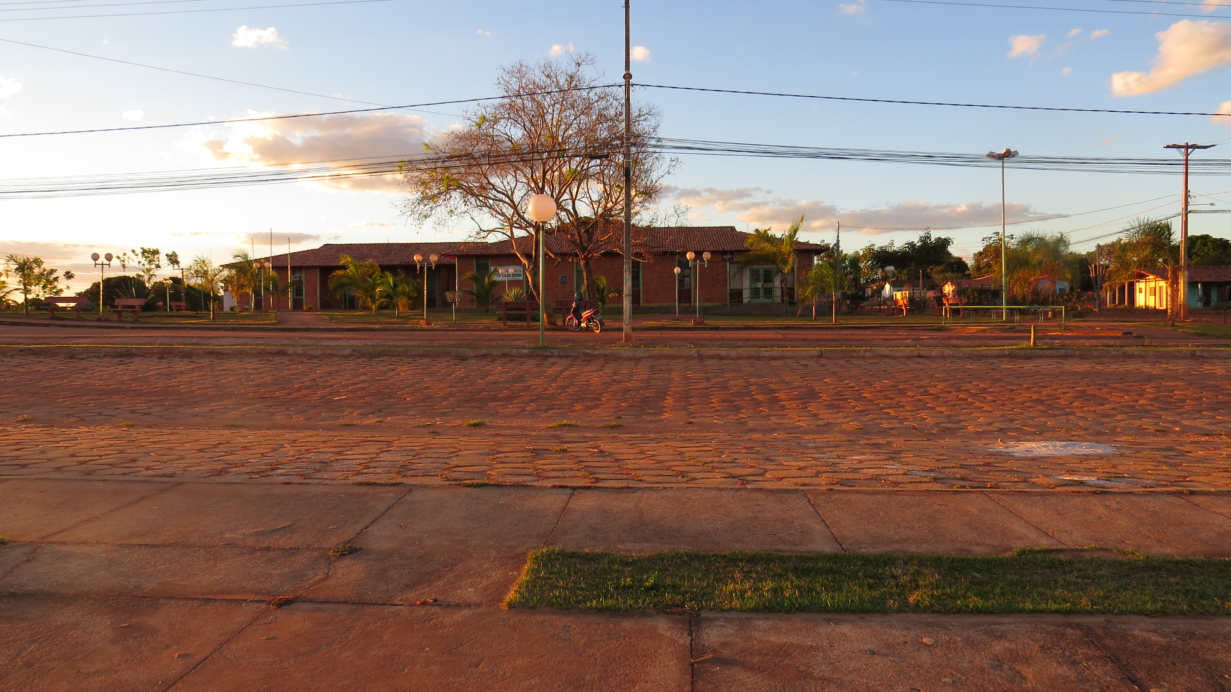 Prefeitura e Correios de Mateiros